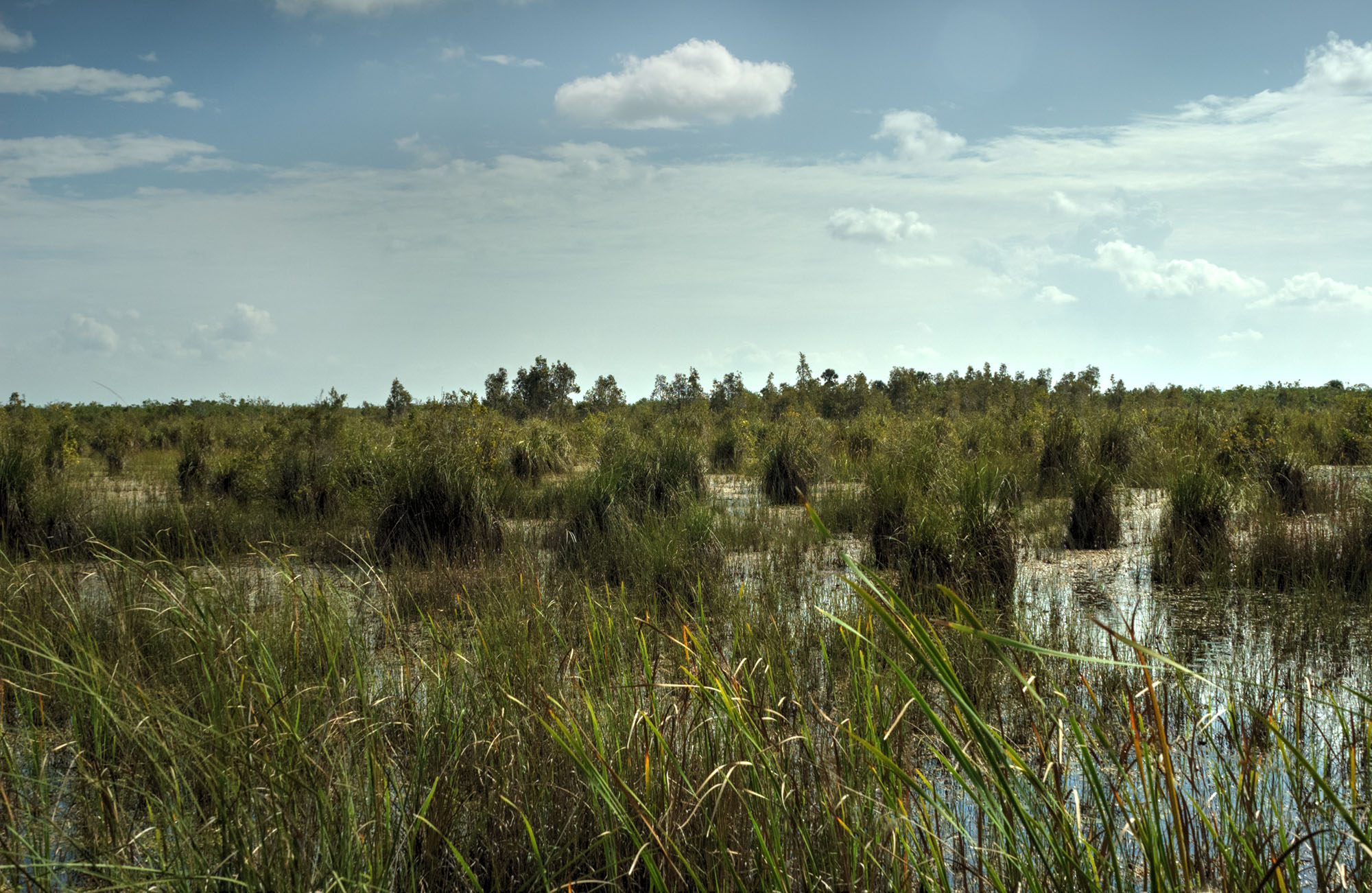 Ciénaga